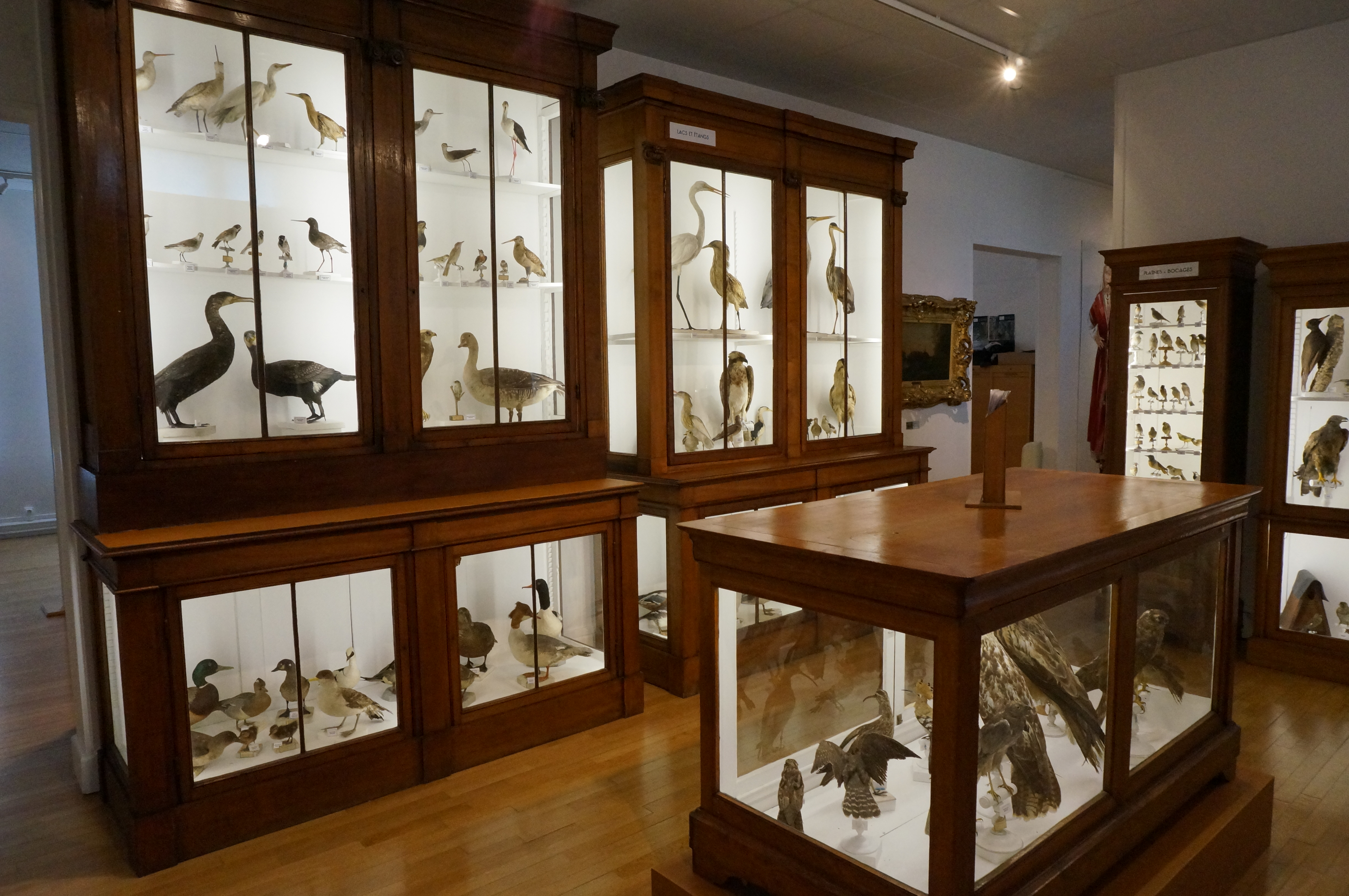 Présenté au musée de st-Dizier .